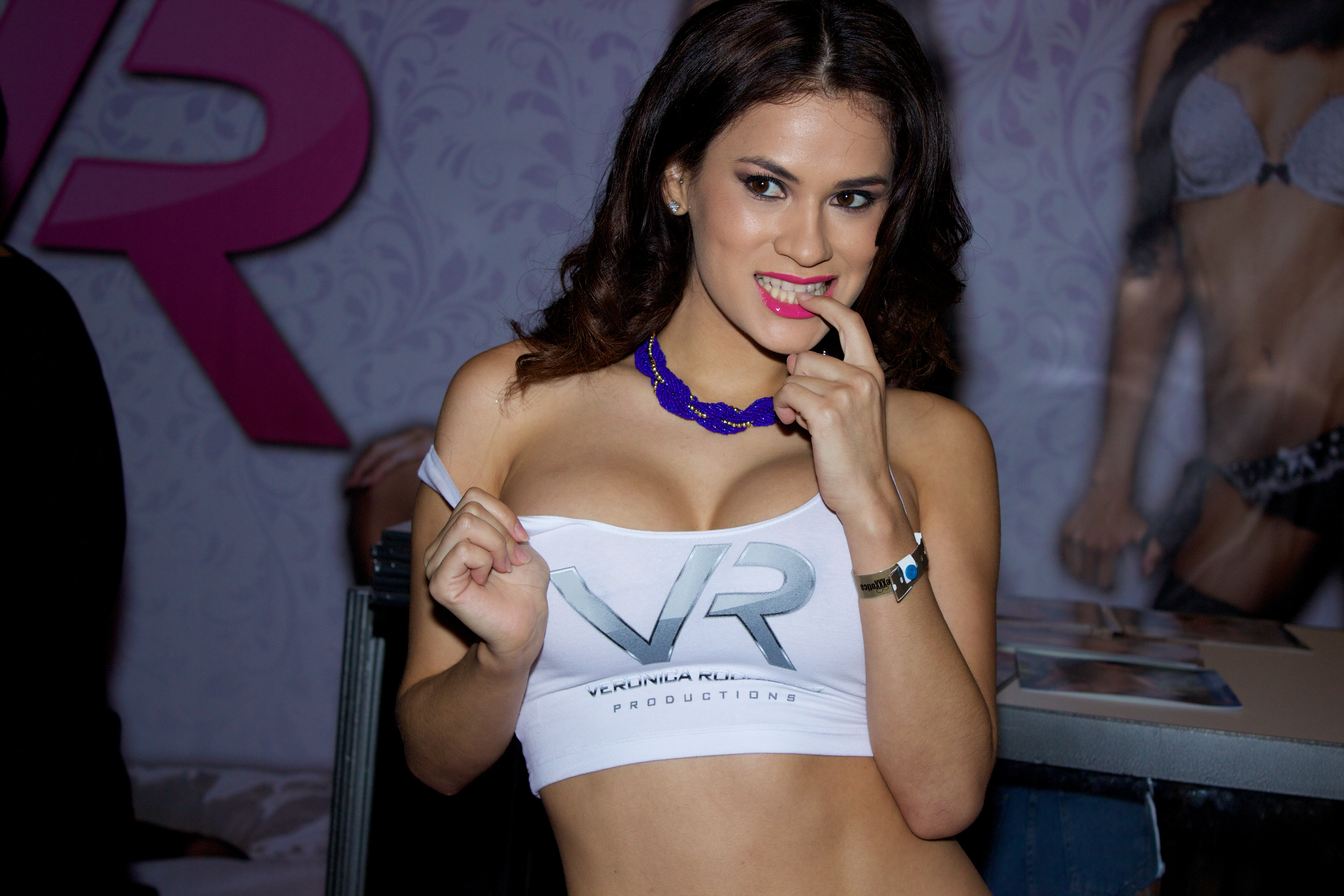 Vanessa Veracruz